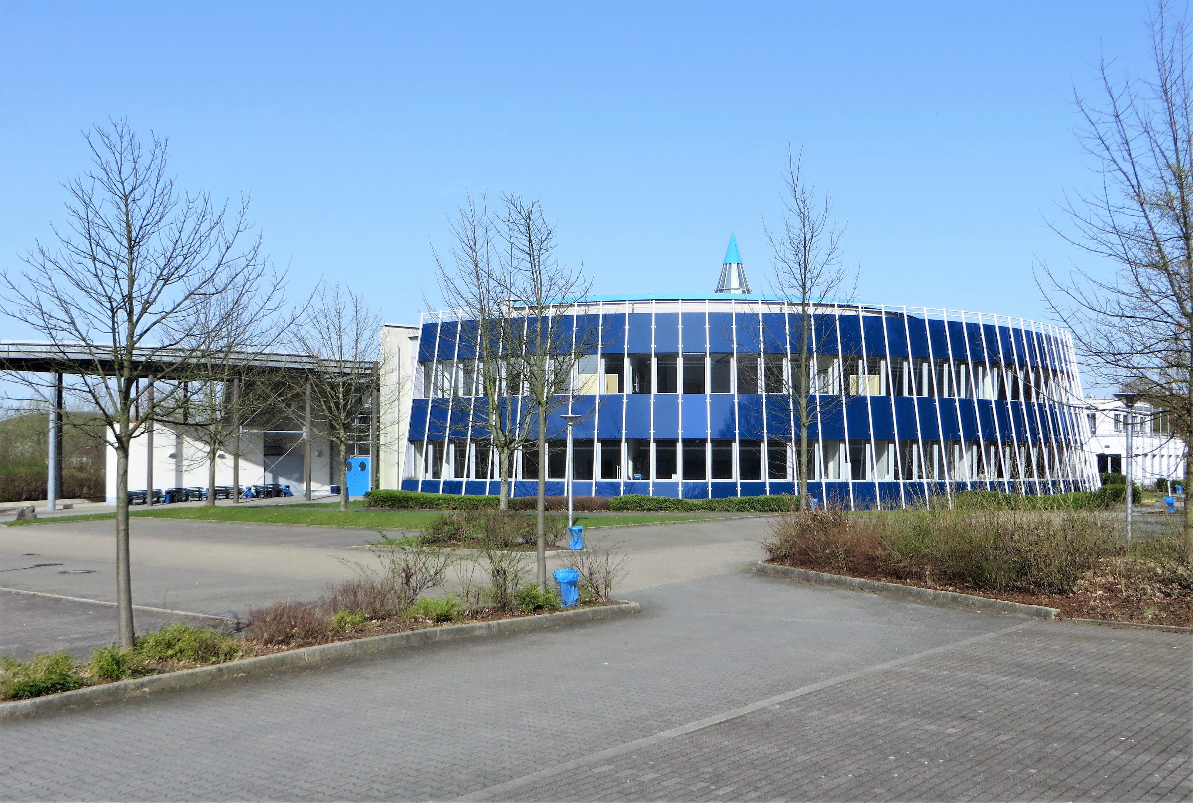 SIHK Bildungszentrum in Hagen-Wehringhausen, Eugen-Richter-Straße 110. Erbaut 1998.